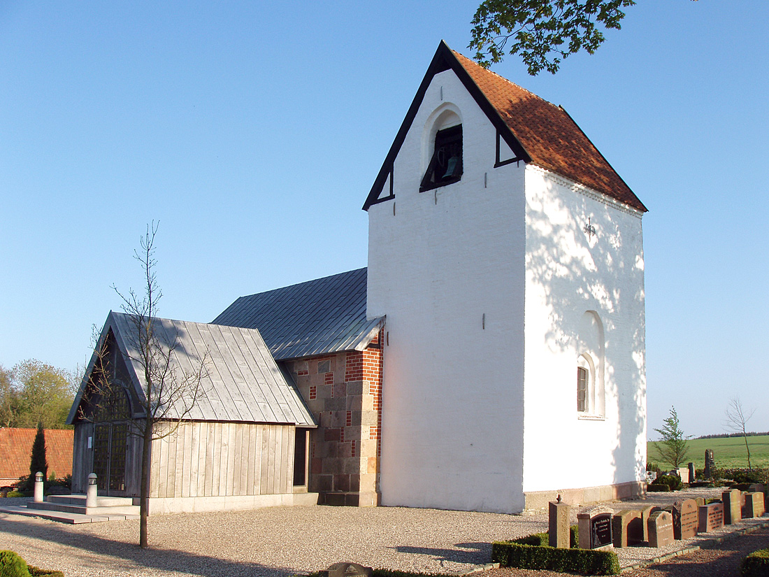 Nørbæk Kirke ,Nørbæk Sogn, Randers Kommune, Denmark